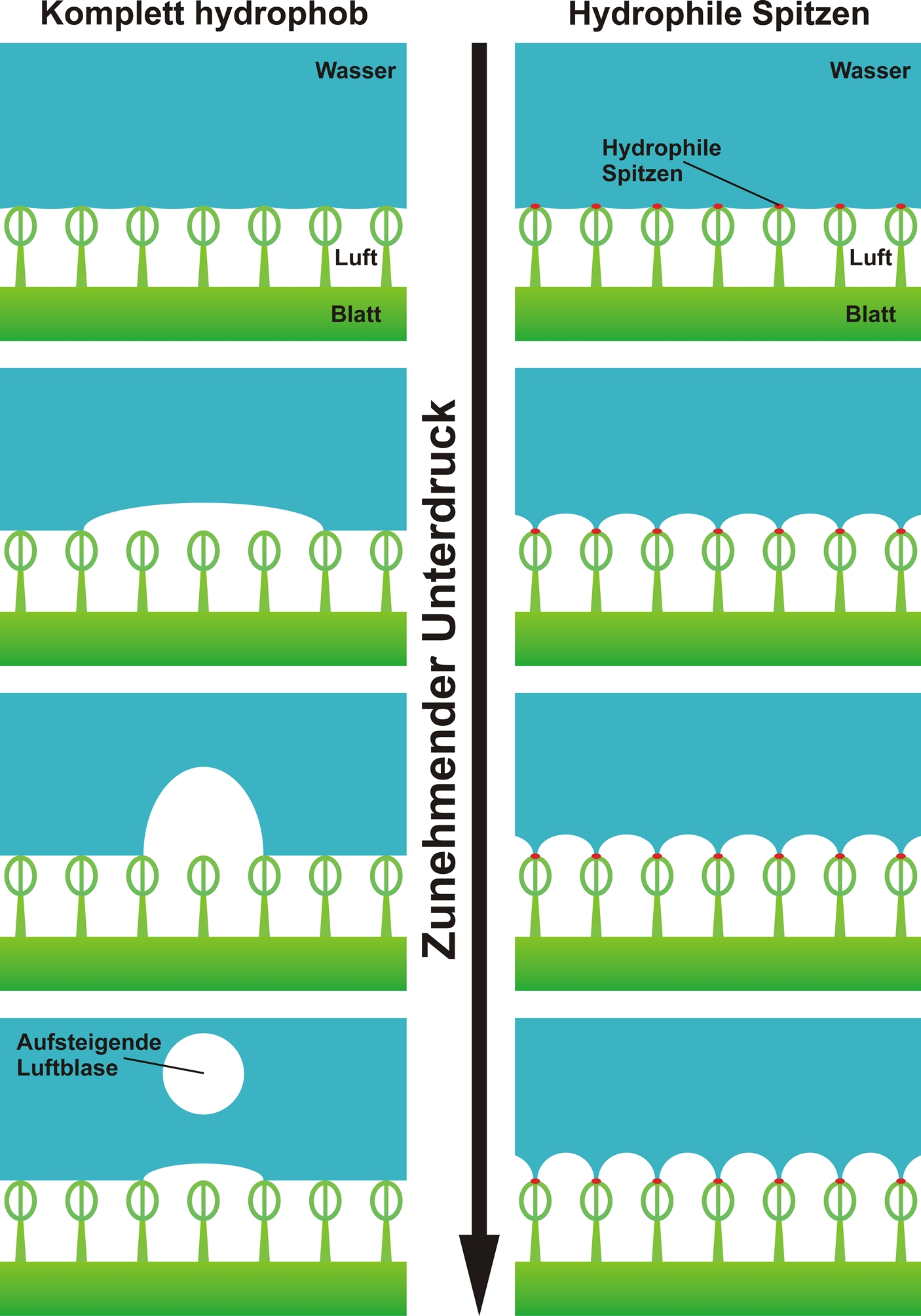 Schematische Abbildung der Stabilisierung unter Wasser gehaltener Luftschichten durch hydrophile Strukturspitzen (Salvinia-Paradox)